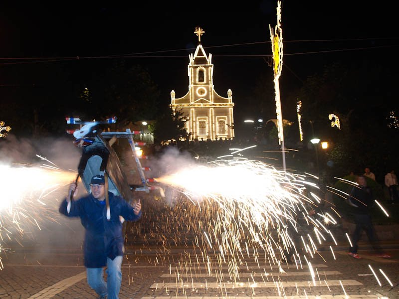 Símbolo etnográfico pirotécnico usado em festividades da região.